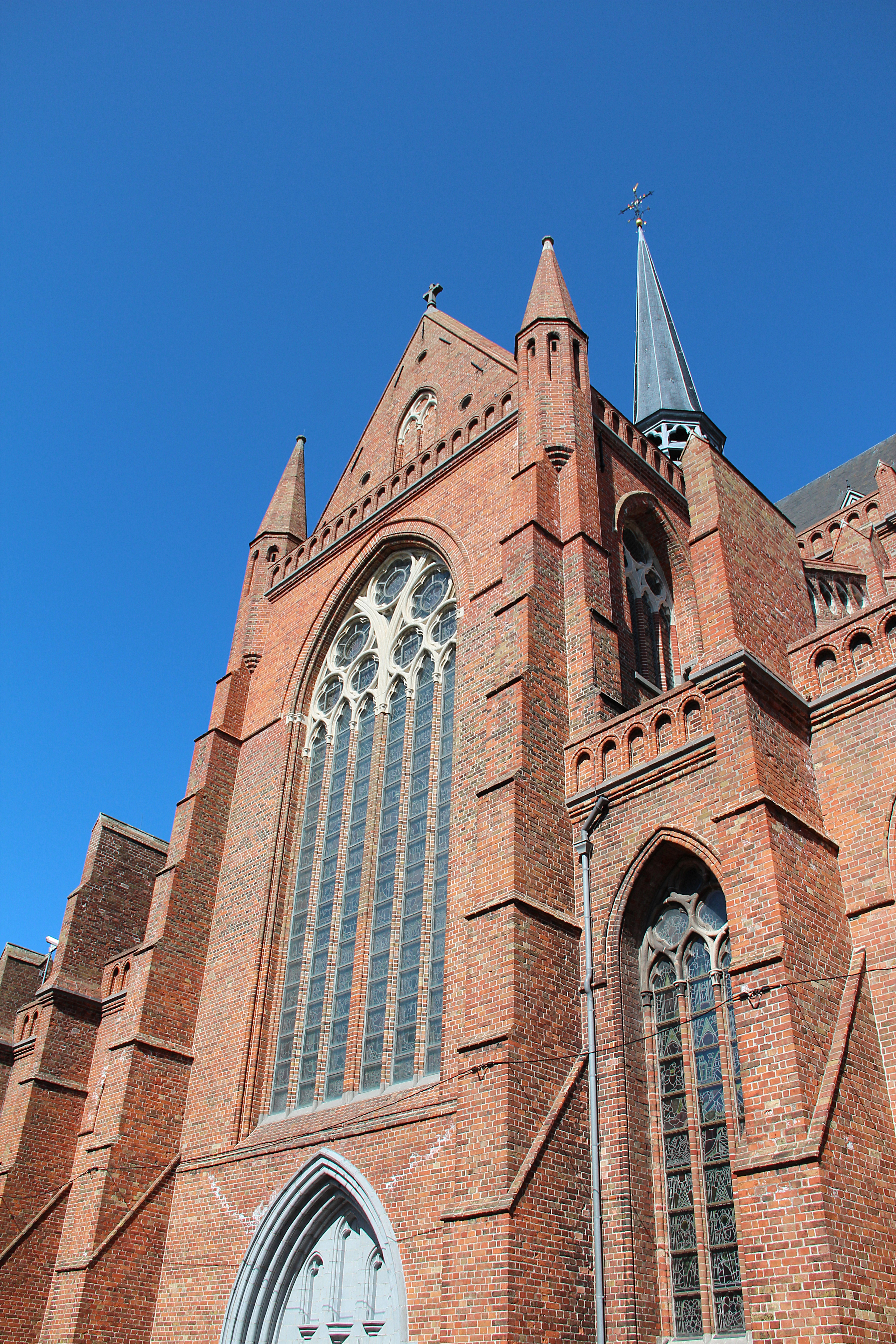 Veurne (België): de Sint-Walburgakerk.